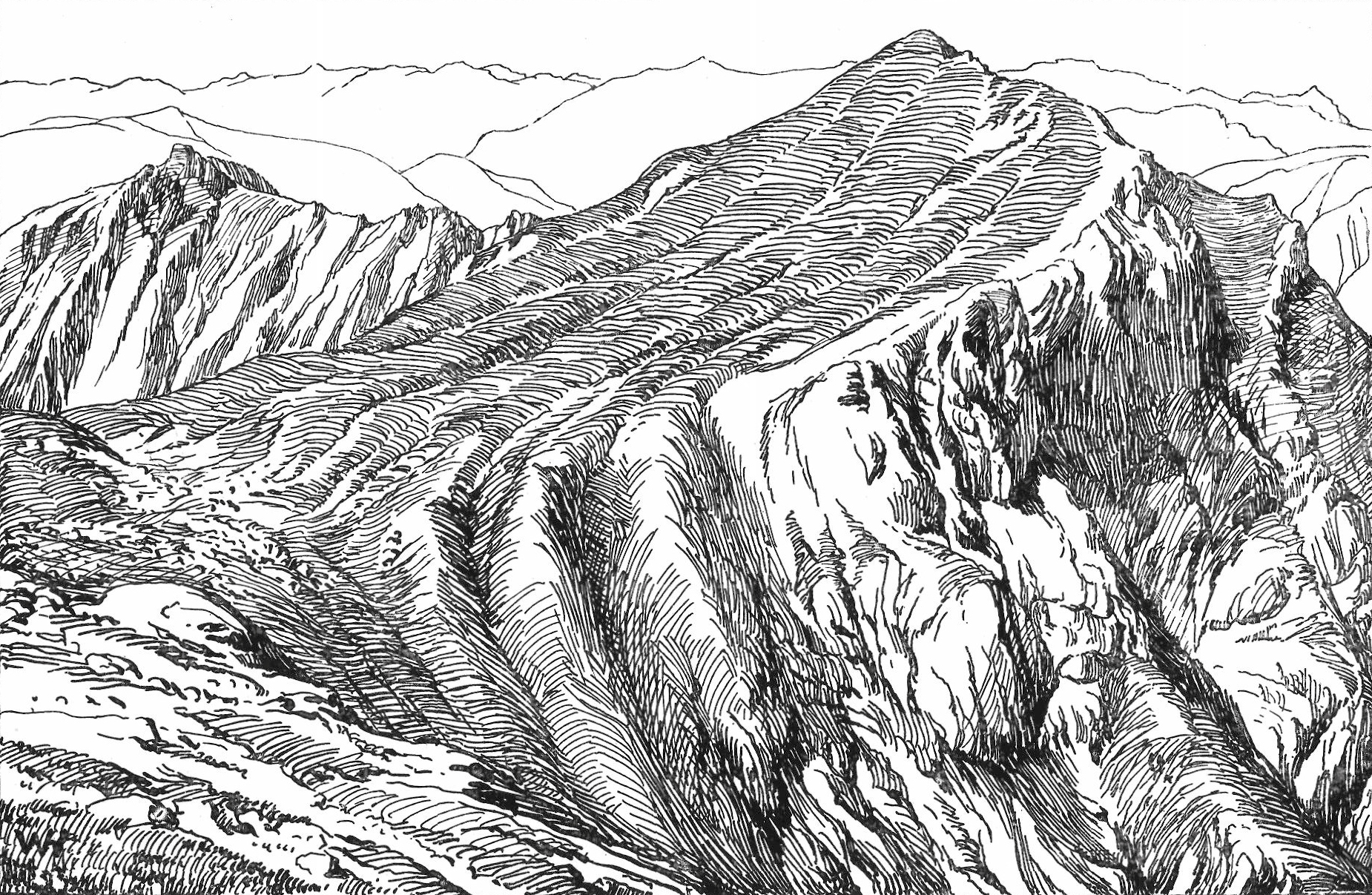 Die Riffel in den steirischen Gesäusebergen, Federzeichnung von W. Hammer (1935)